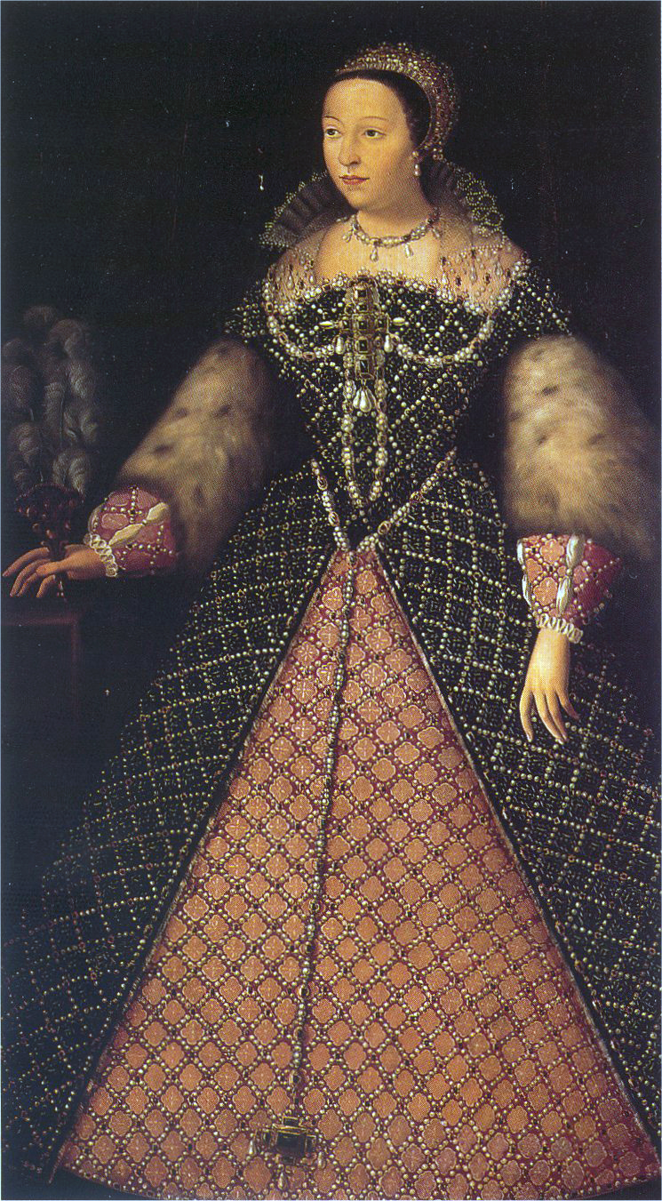 Katharina von Medici, Frau von Heinrich II. und Königin von Frankreich